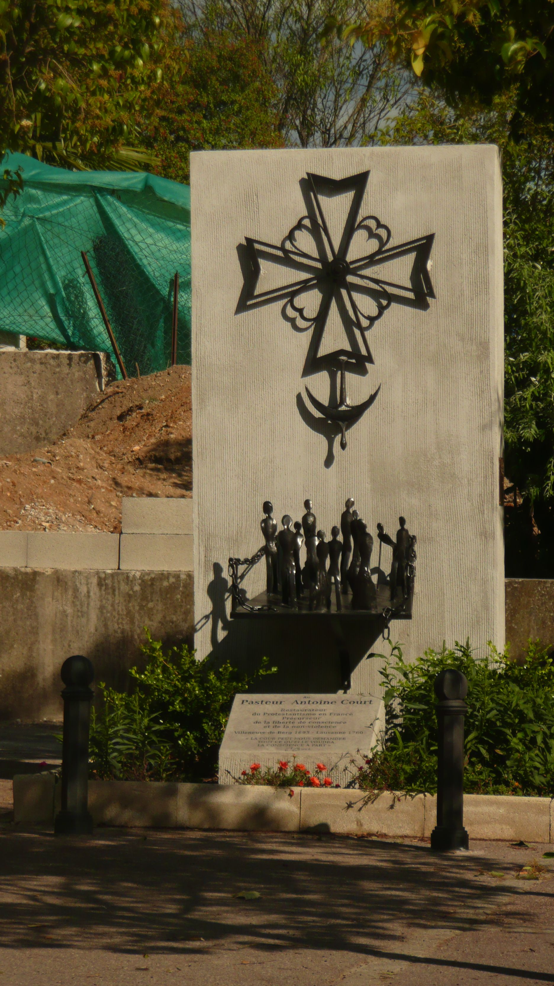 07170 Villeneuve-de-Berg, France